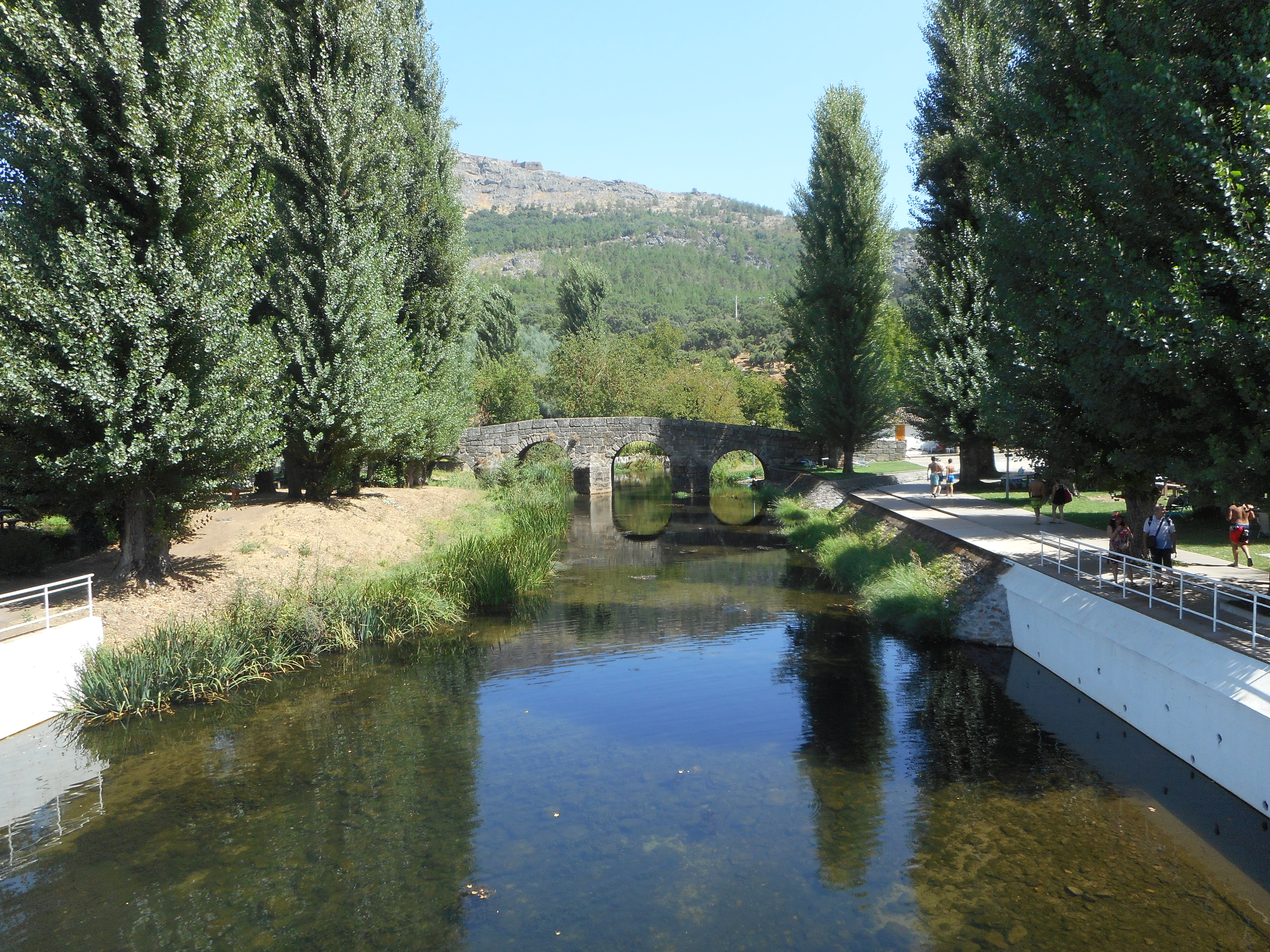 Río Sever en Portagem (Sao salvador de aramenha, Marvao, Portugal), con el puente romano medieval al fondo.